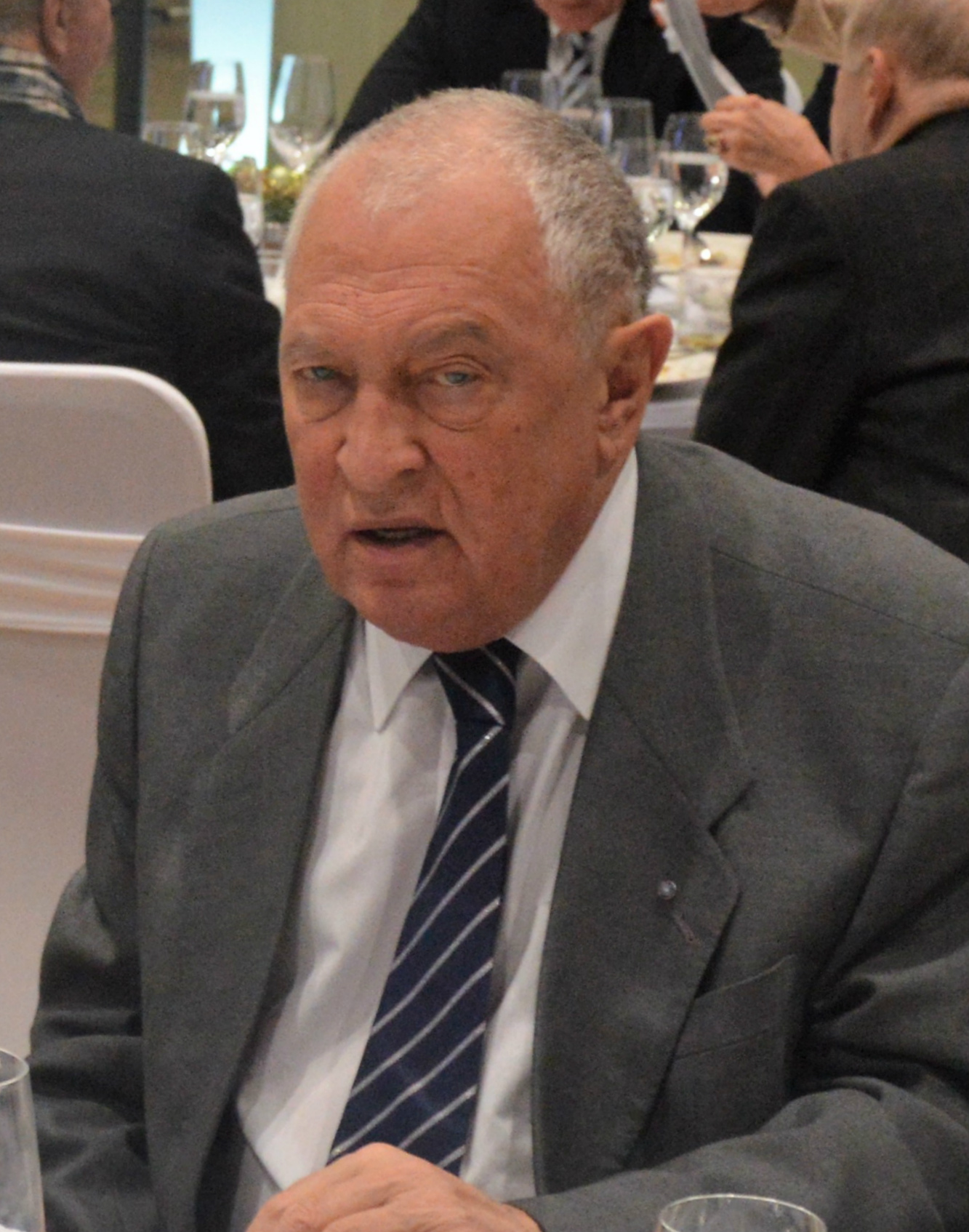 Dr. Fenyvesi Csaba háromszoros olimpiai és világbajnok magyar párbajtőrvívó